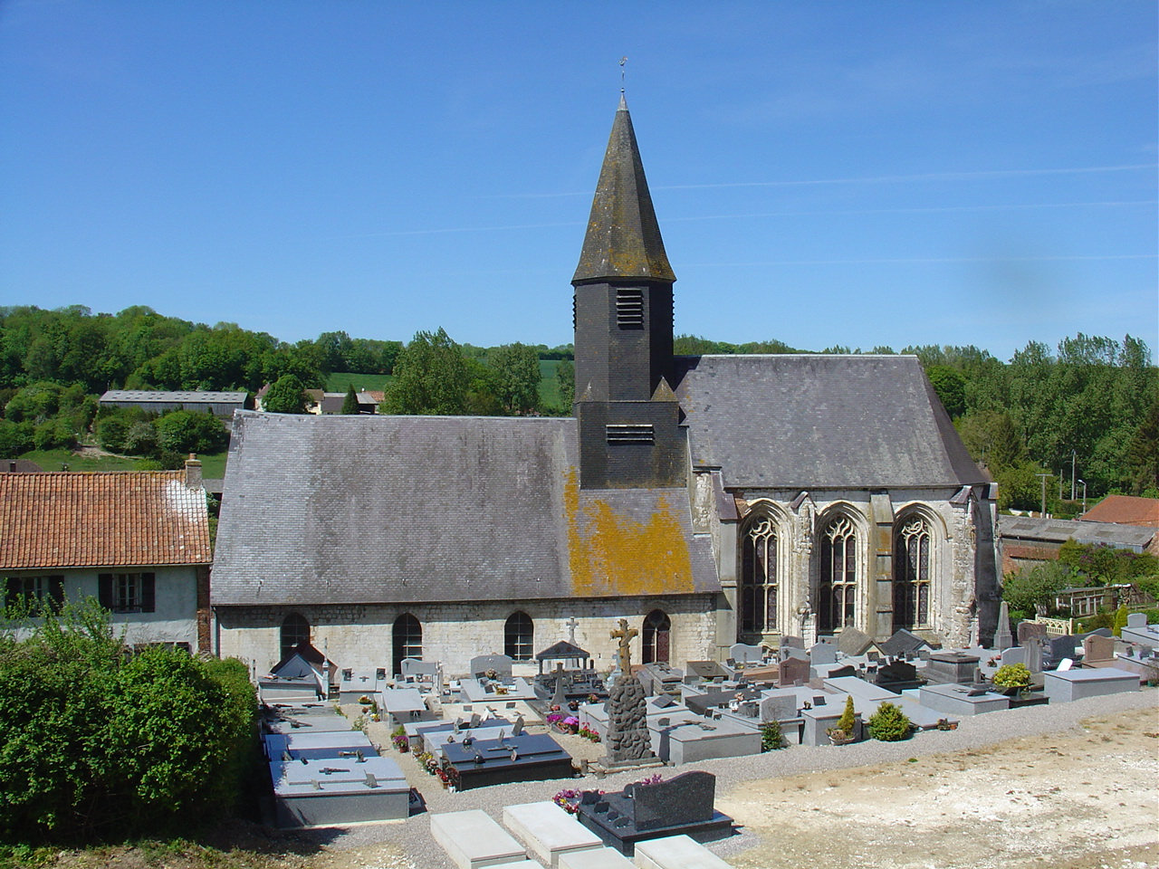 Église de Preures